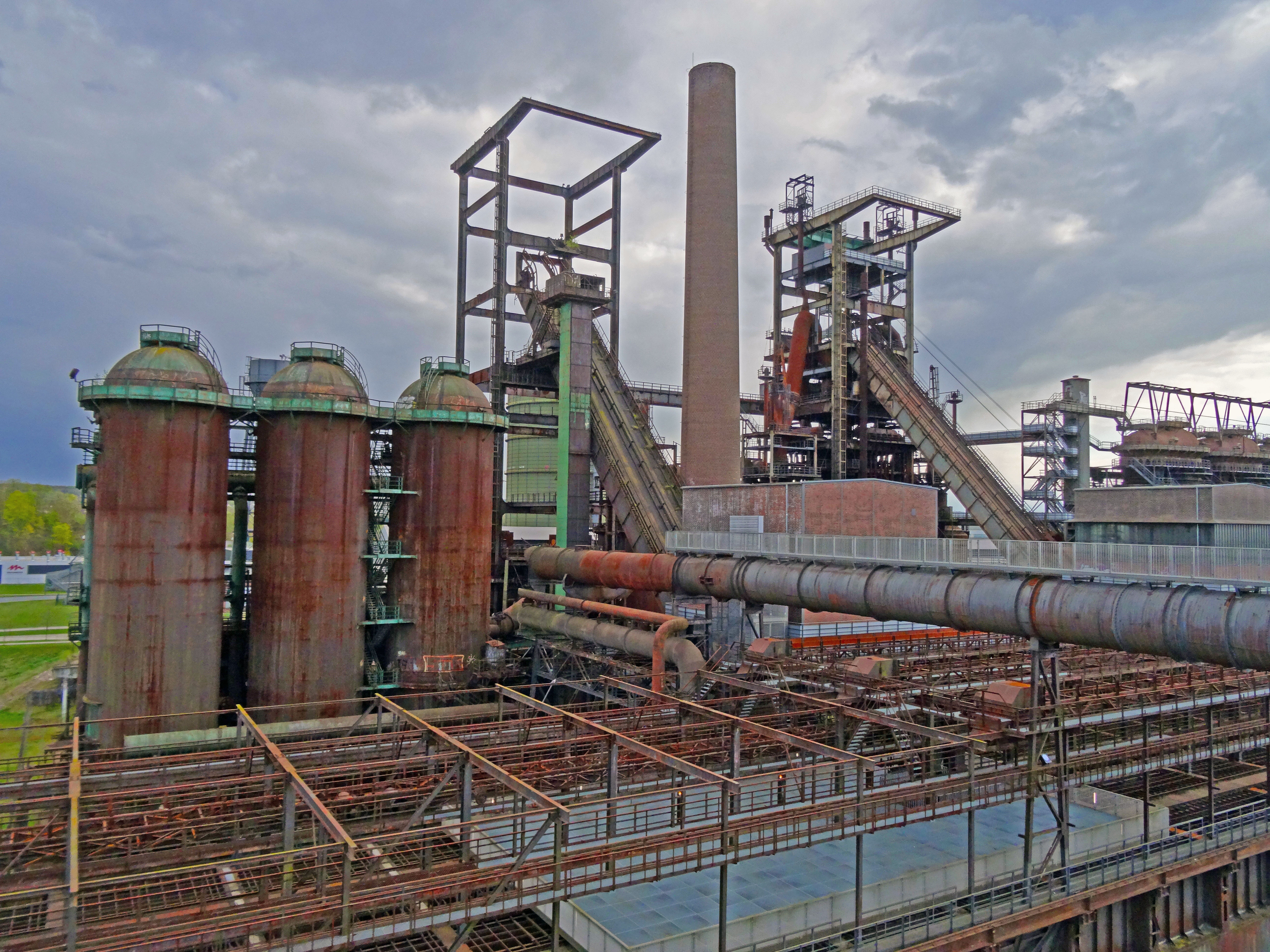 Stahlwerk Phoenix-West